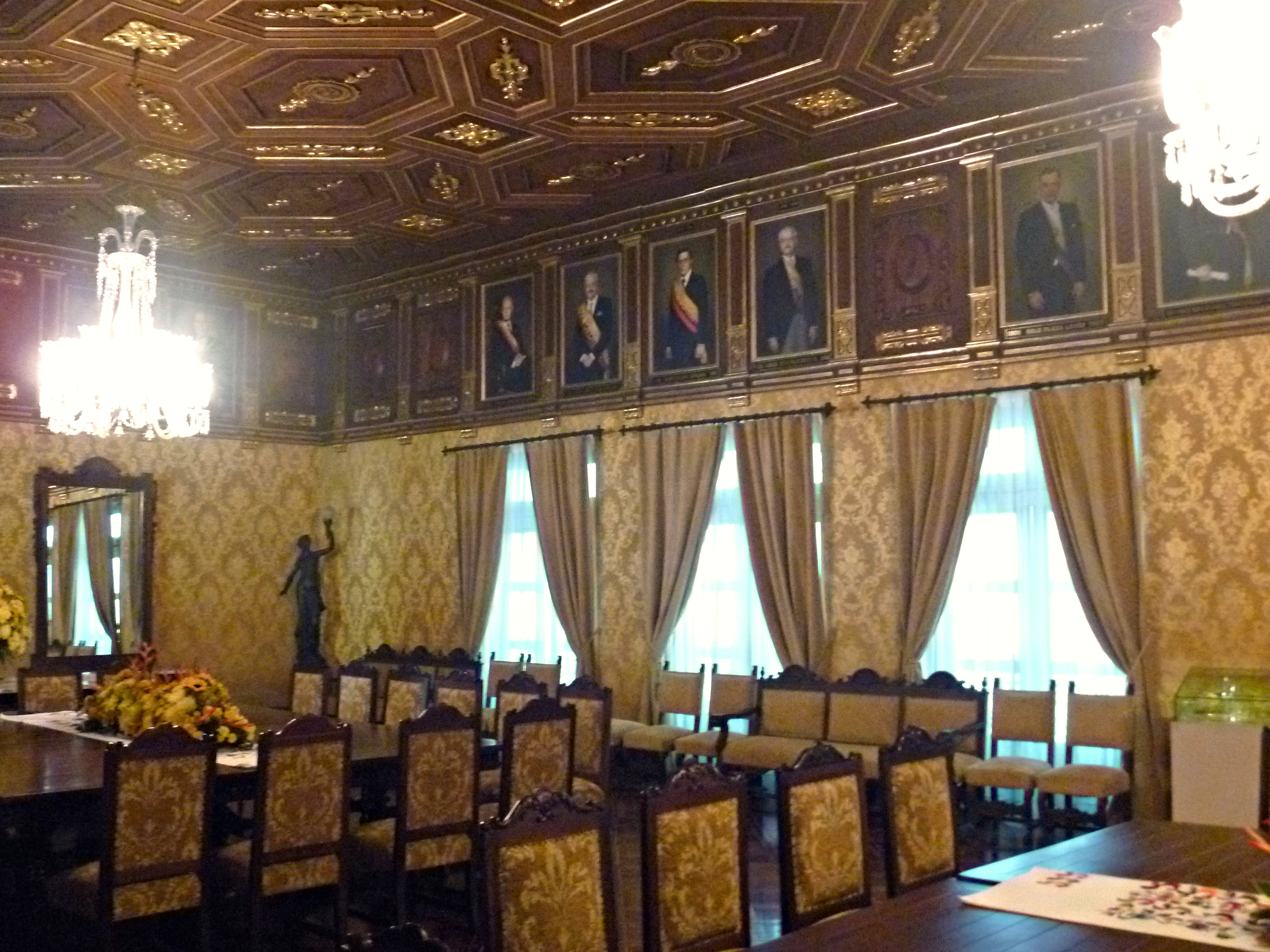 Salón Amarillo del Palacio de Carondelet, también conocido como de Los Presidentes por los retratos de los mandatarios de Ecuador que cuelgan a lo largo de todo el zócalo superior del salón. Se encuentra en el segundo piso del edificio, en la esquina noroccidental, con ventanas hacia las cocheras de la parte trasera.